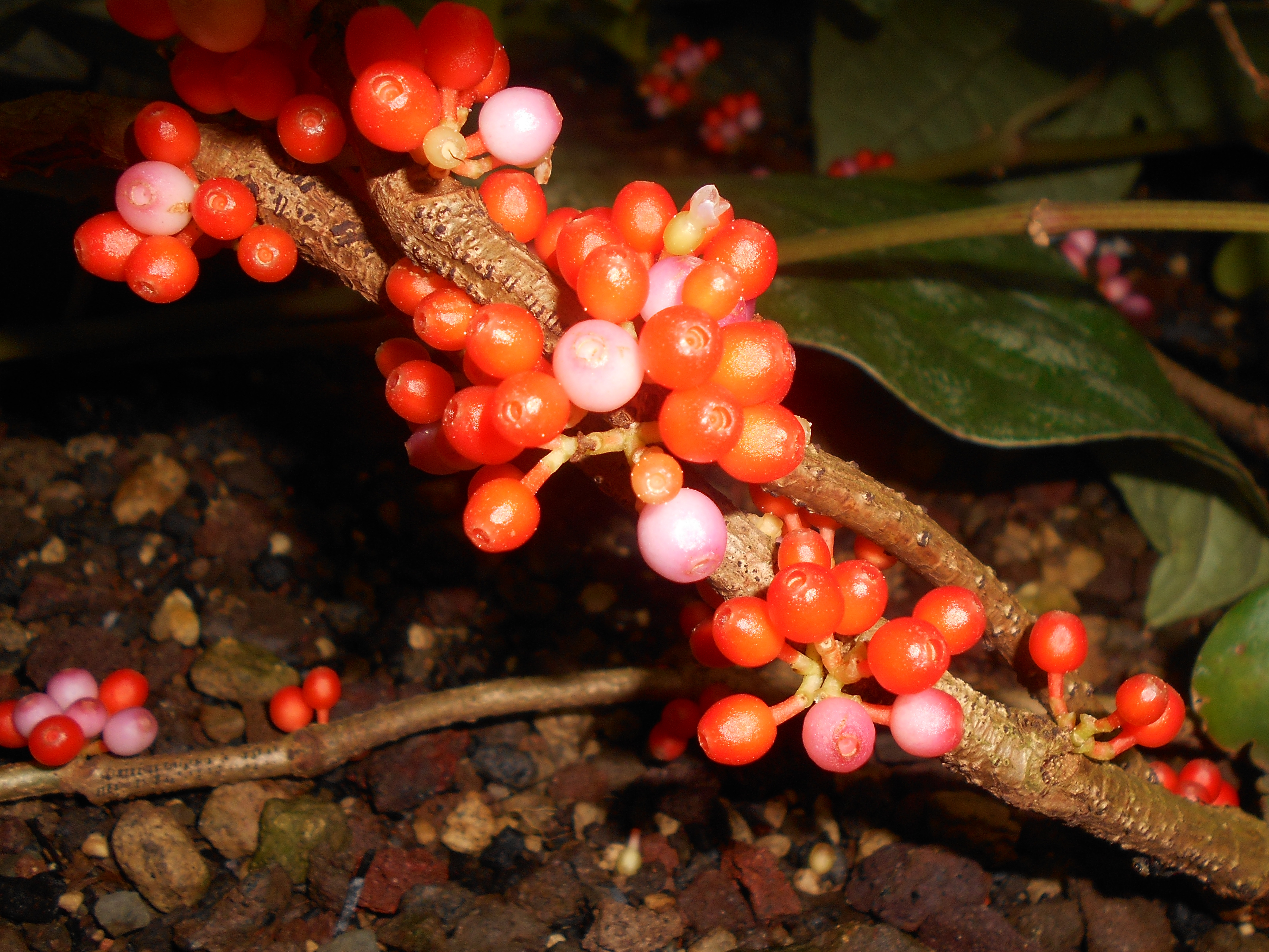 Medinilla myrmecorhiza, Botanischer Garten Berlin.